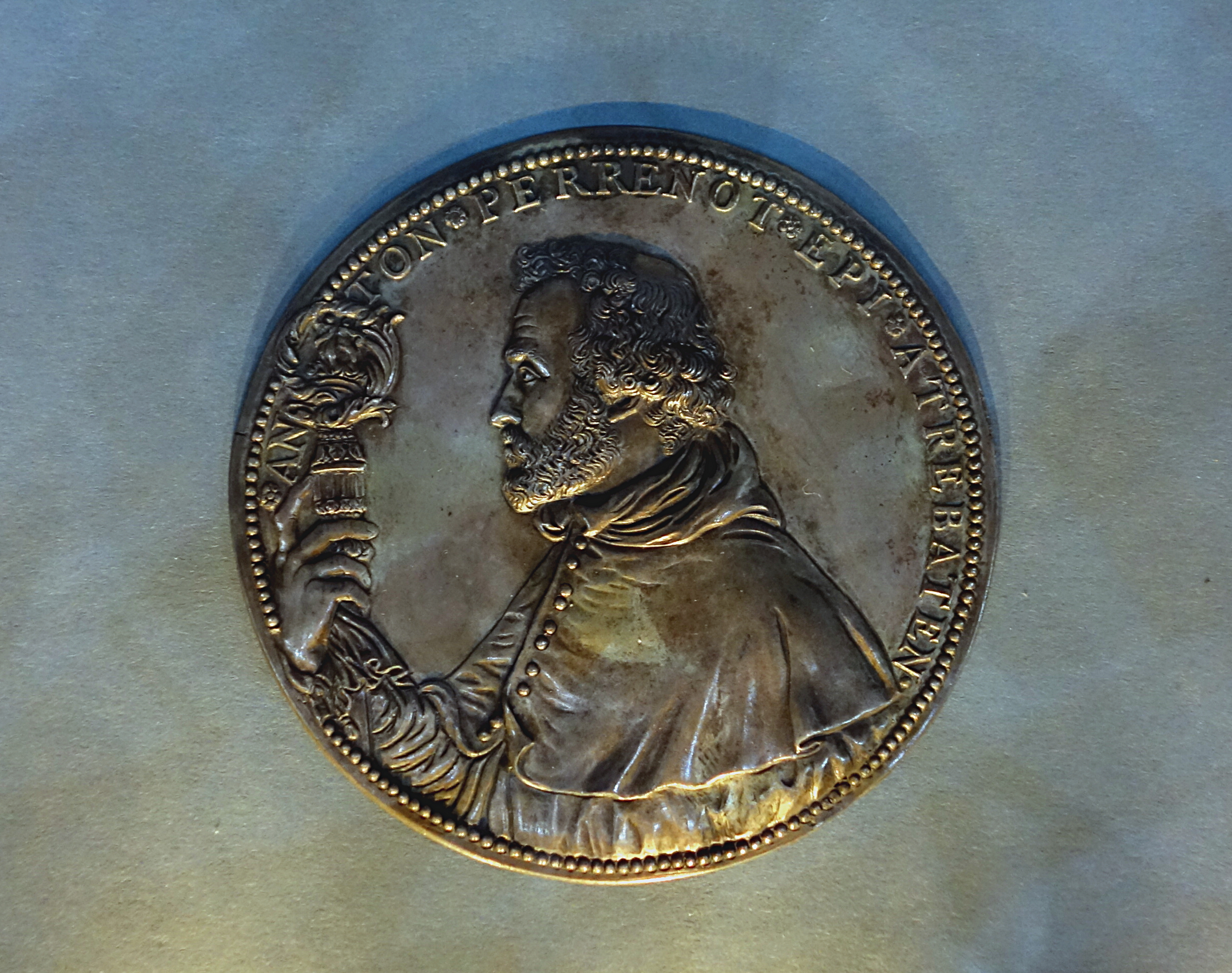 Médaille uniface du cardinal Granvelle, au Palais des beaux-arts de Lille.